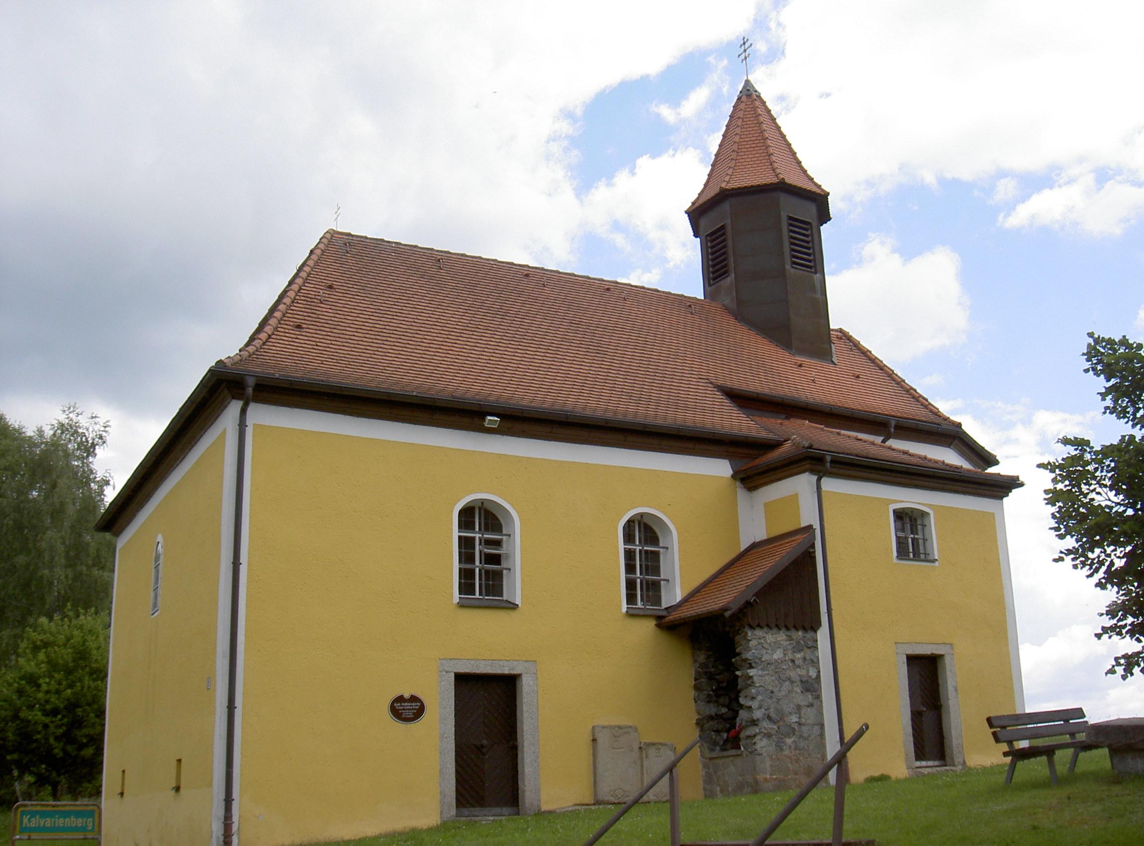 Oberlind Kalvarienberg